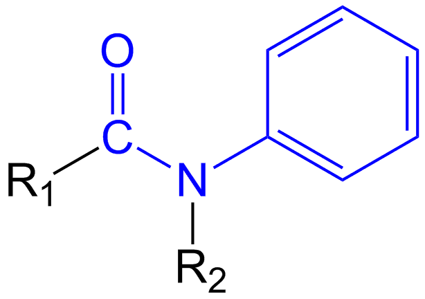 Anilide algemene structuurformule